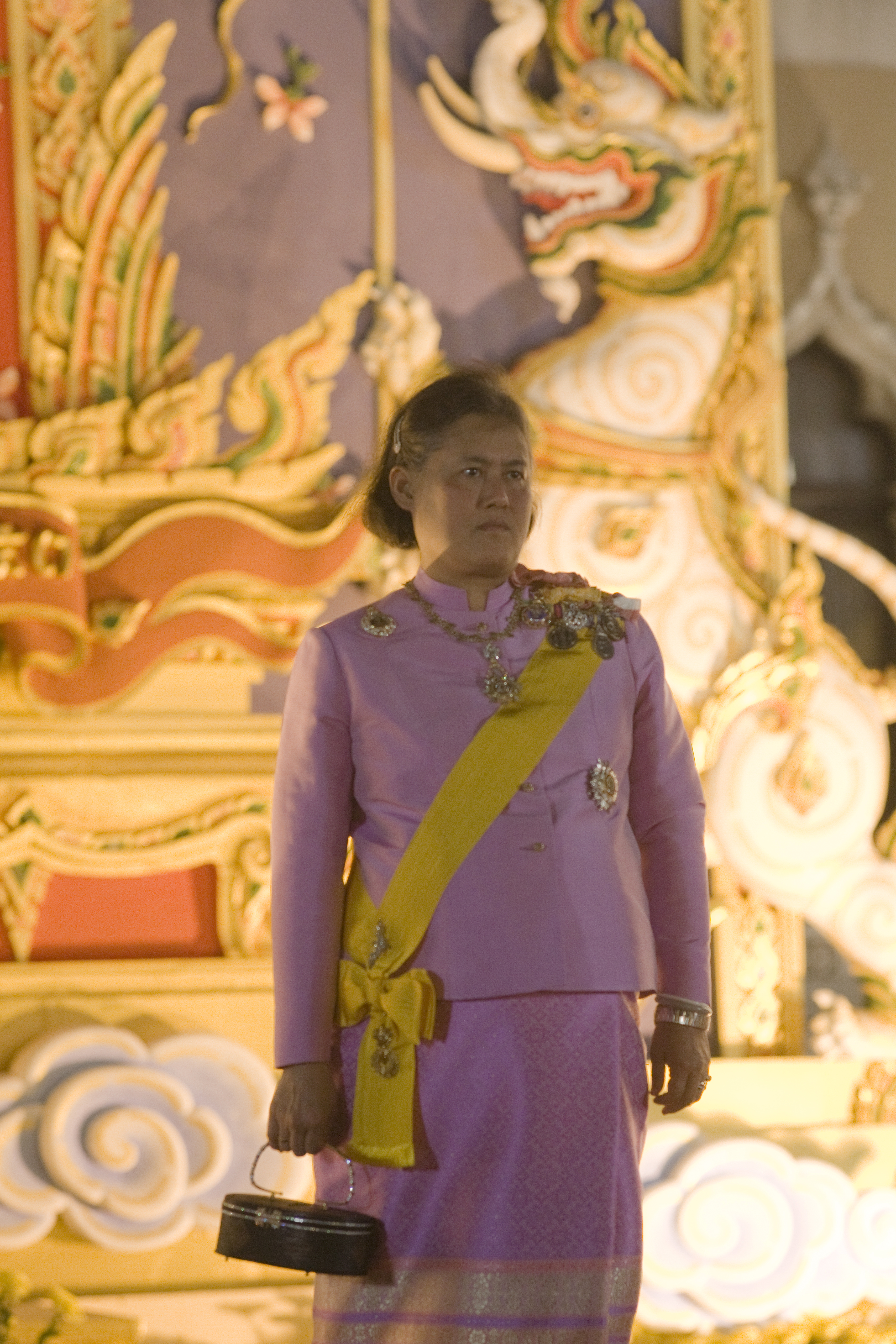 นายกรัฐมนตรี และภริยา เฝ้าฯ รับเสด็จ สมเด็จพระเทพรัตนราชสุดาฯ สยามบรมราชกุมารี เสด็จพระราชดำเนินพร้อมด้วยพระบรมวงศานุวงศ์ในงานสโมสรสันนิบาตเฉลิมพระเกียรติพระบาทสมเด็จพระเจ้าอยู่หัว เนื่องในโอกาสมหามงคลเฉลิม พระเกียรติพระชนมพรรษา วันอังคารที่ 7 ธันวาคม พ.ศ.2553 (Photographer attached to the Prime Minister of the Kingdom of Thailand : Peerapat Wimolrungkarat / พีรพัฒน์ วิมลรังครัตน์) @is50mm